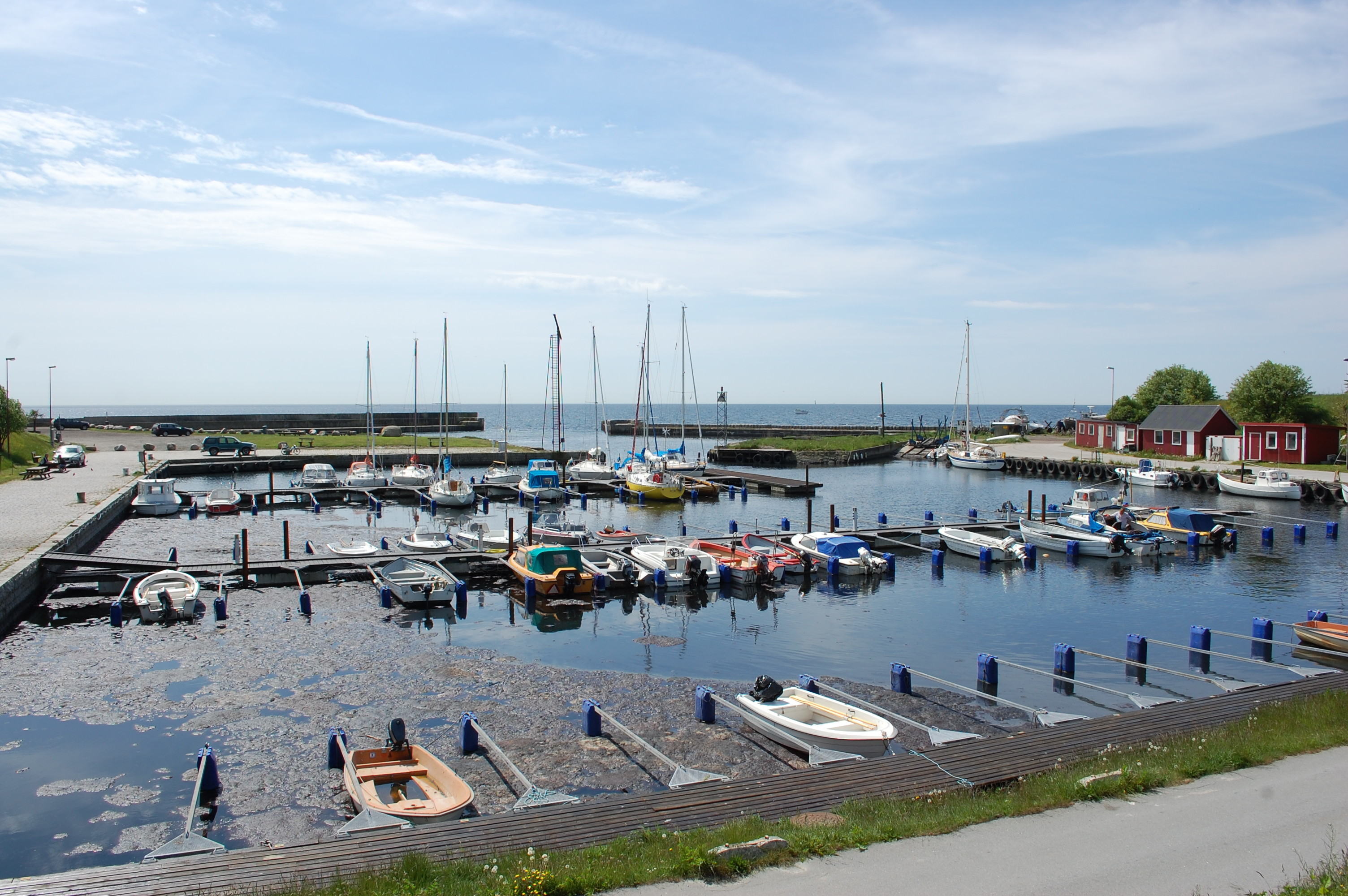 Hafen von Smygehamn